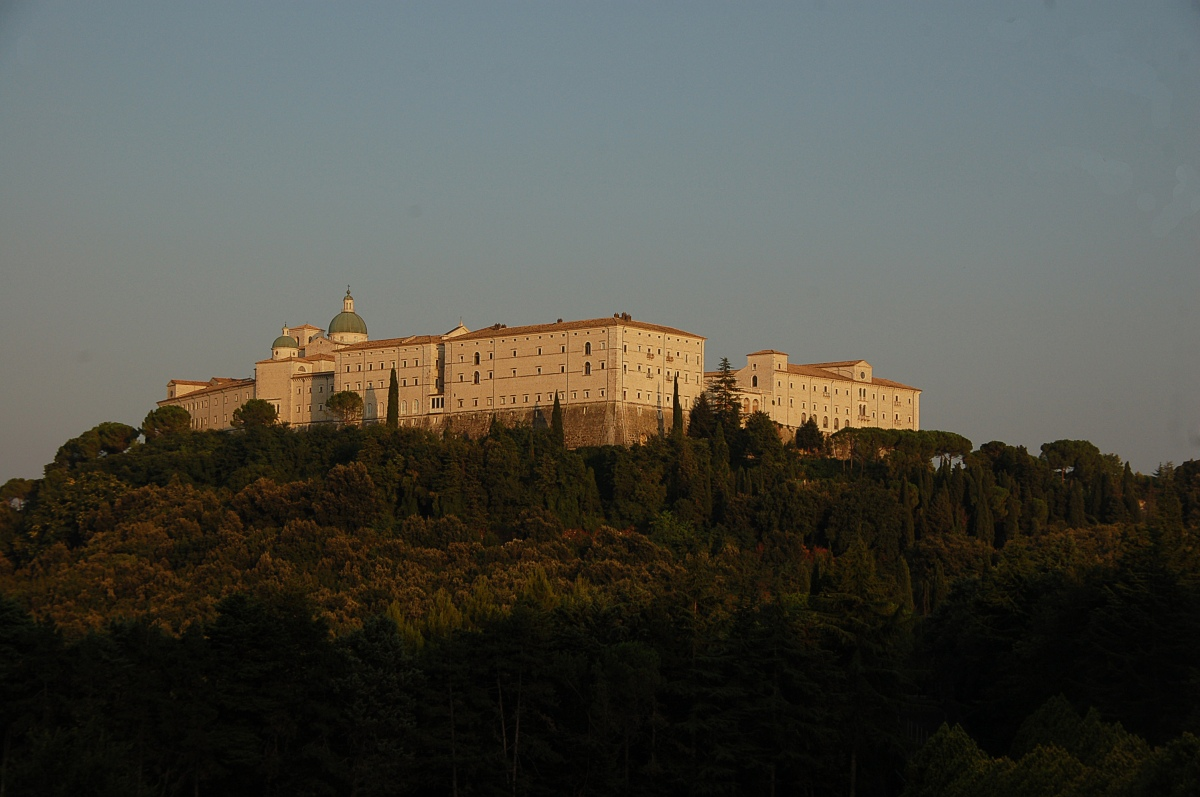 Der poilnische Soldatenfriedhof Monte Cassino